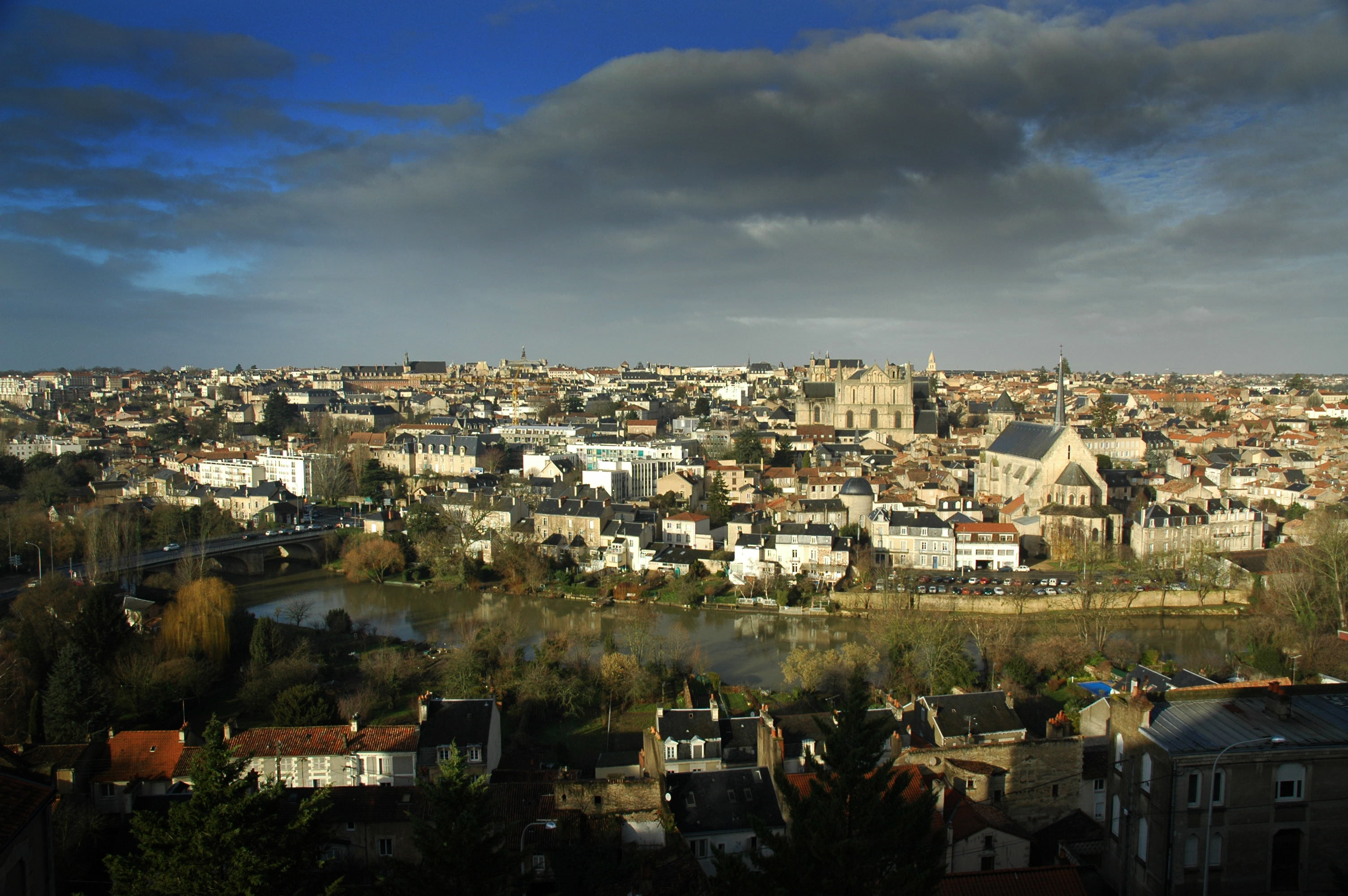 Centre de Poitiers. Vue depuis le quartier des Dunes : église Sainte-Radegonde, cathédrale Saint-Pierre, palais de Justice.